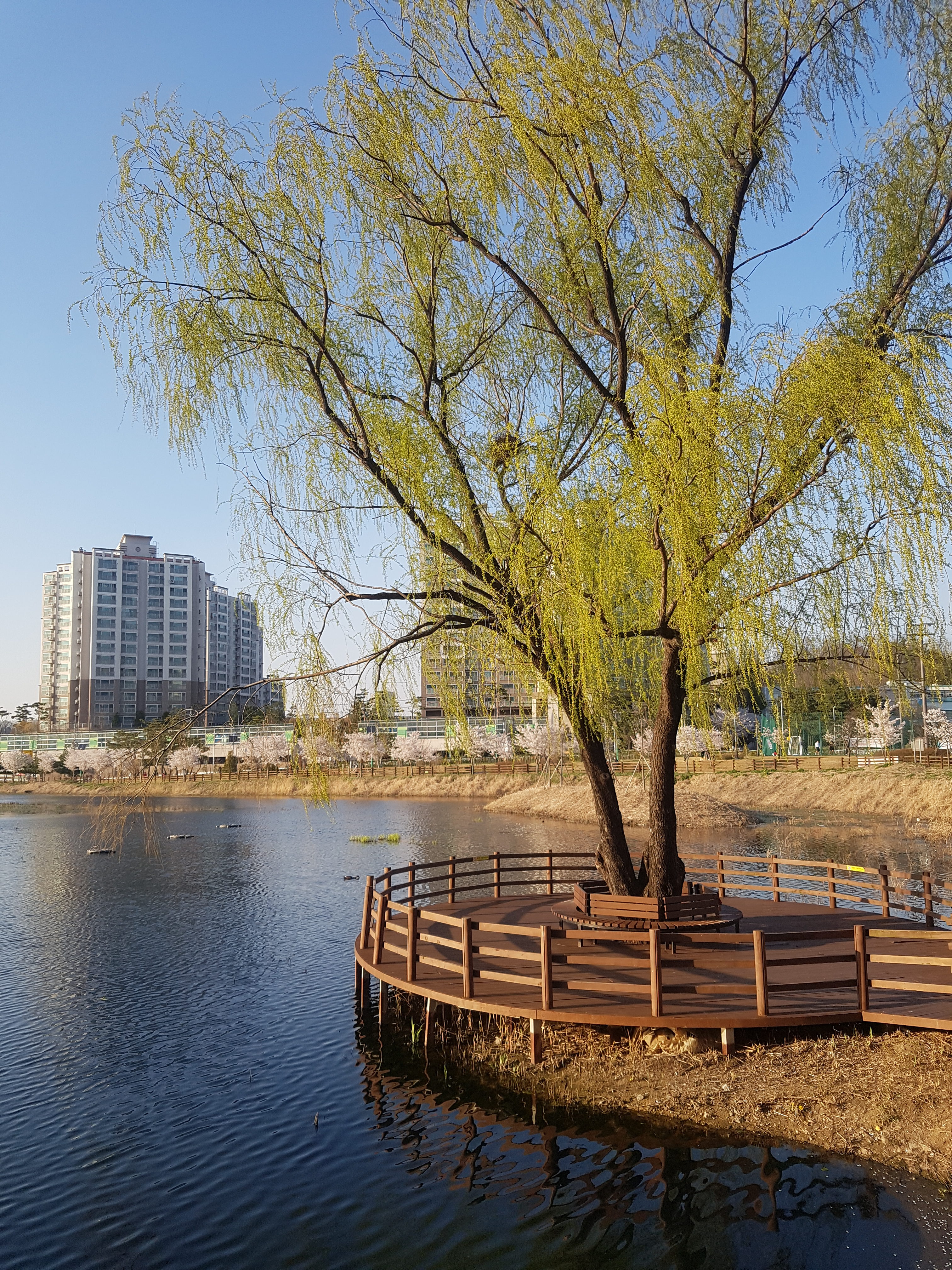 능수버들-청수호수공원